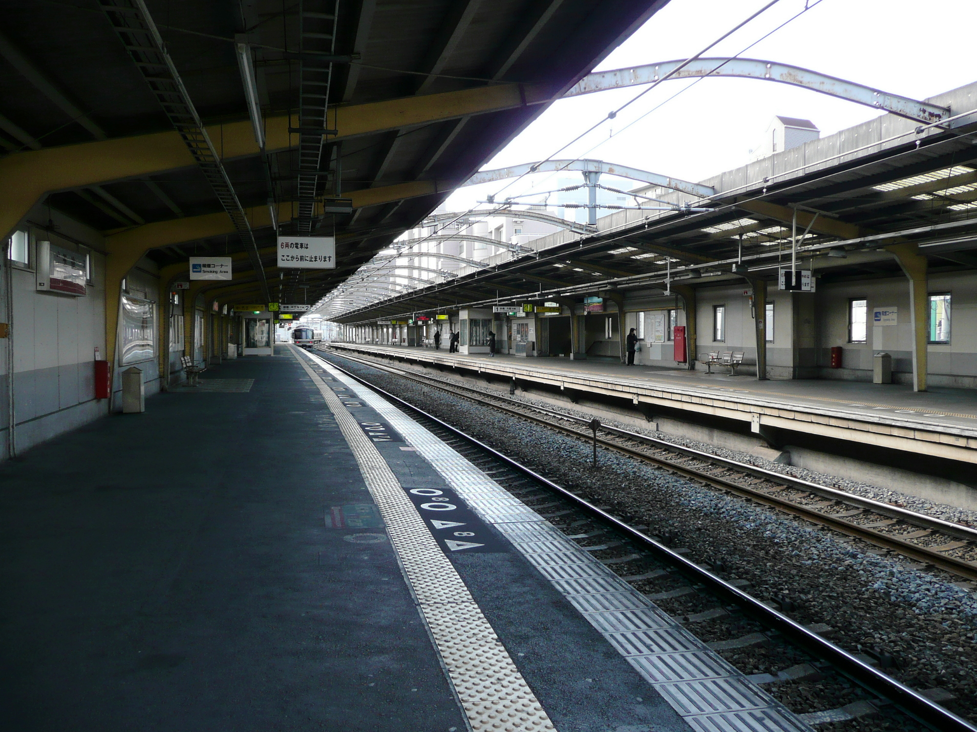 West Japan Railway,Osaka roop Line,Tamatsukuri Station platform. / 大阪環状線玉造駅ホーム